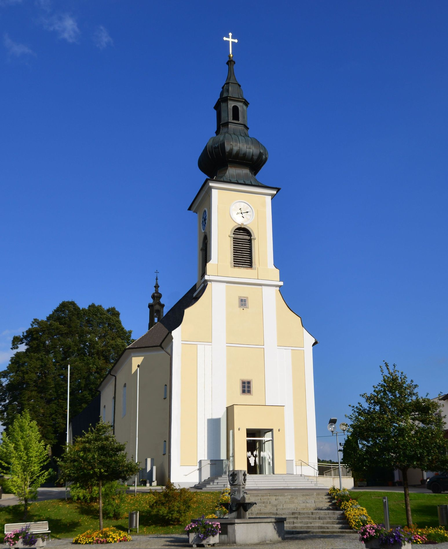 Die Kirche wurde von 2010 bis 2016 innen und außen renoviert.